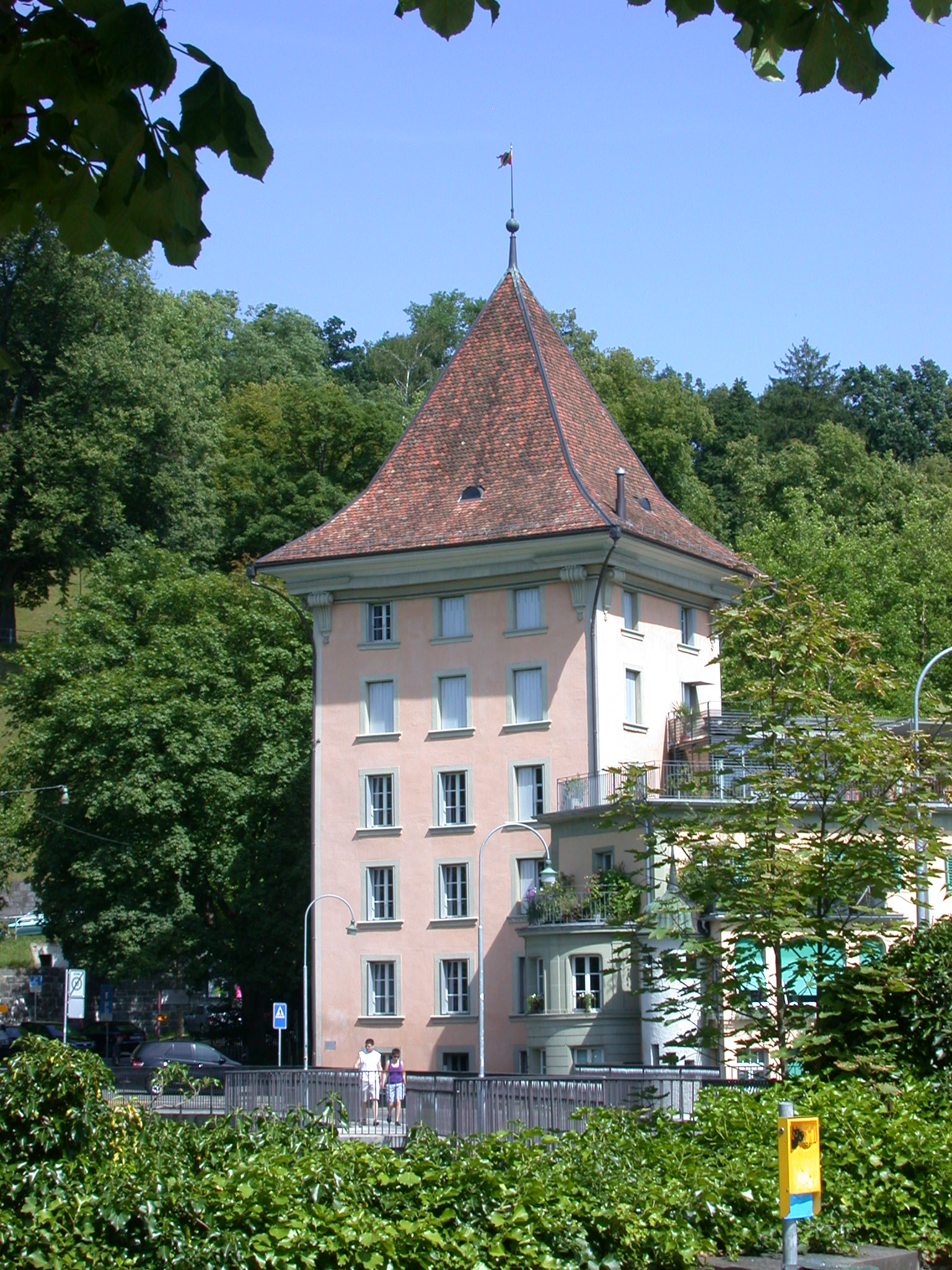 Die Felsenburg, ein ehemaliger Befestigungsturm der Stadt Bern